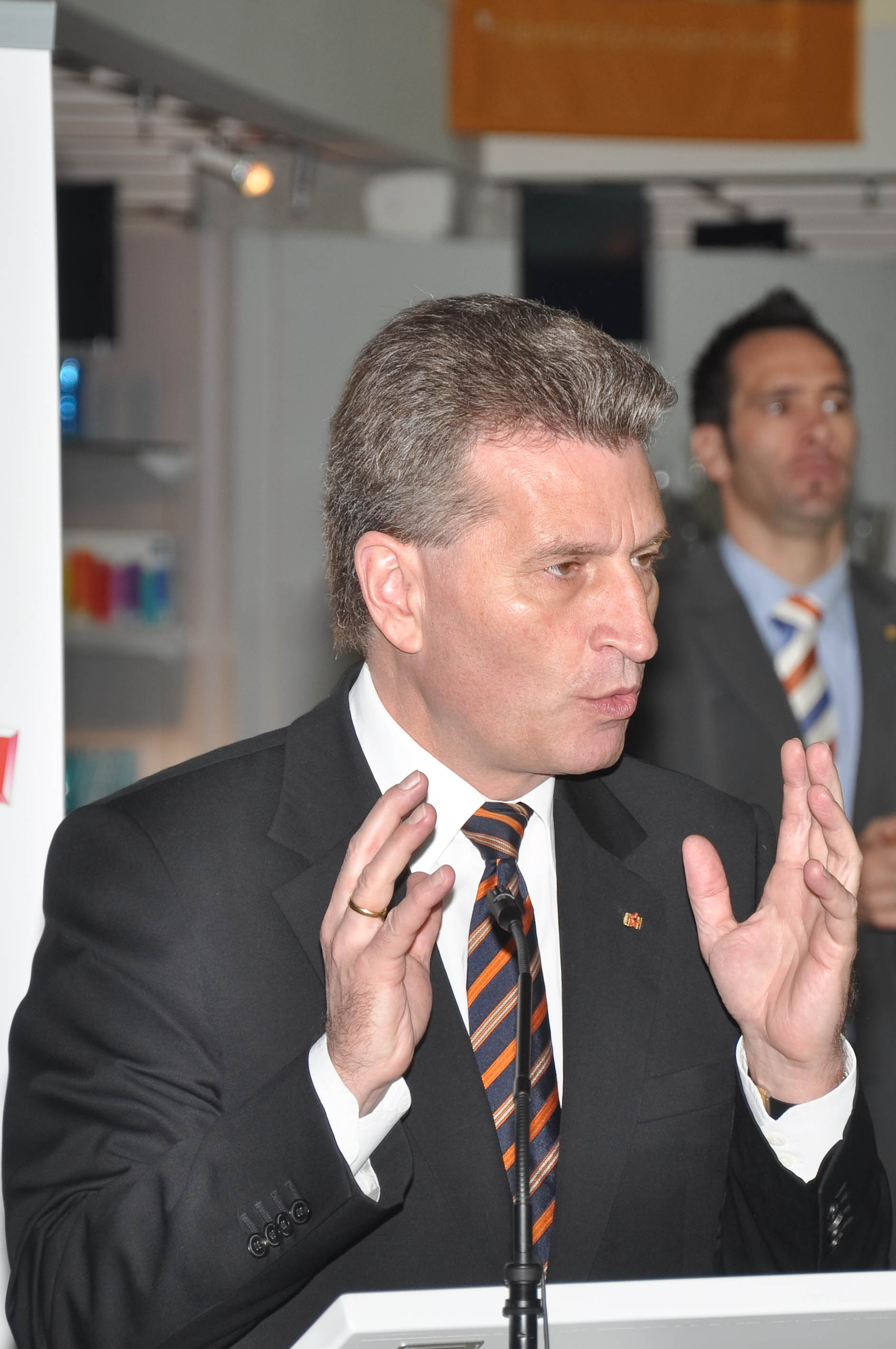 Günther Oettinger beim Neujahrsempfang der CDU in Bopfingen